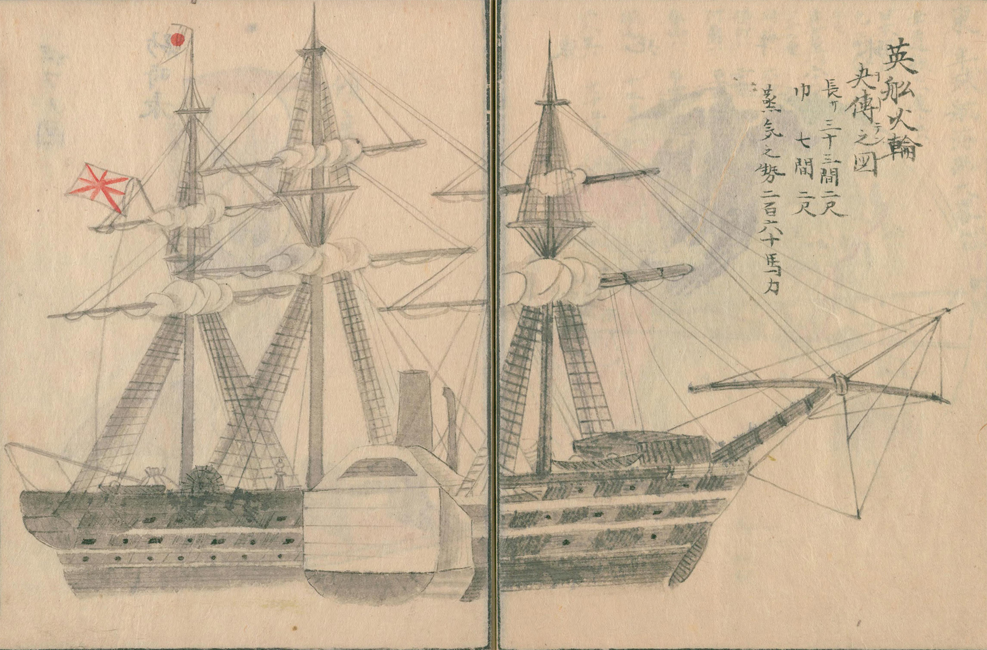 文久遣欧使節が乗船したオーデン号 『欧西行紀』 高島祐啓 1867年